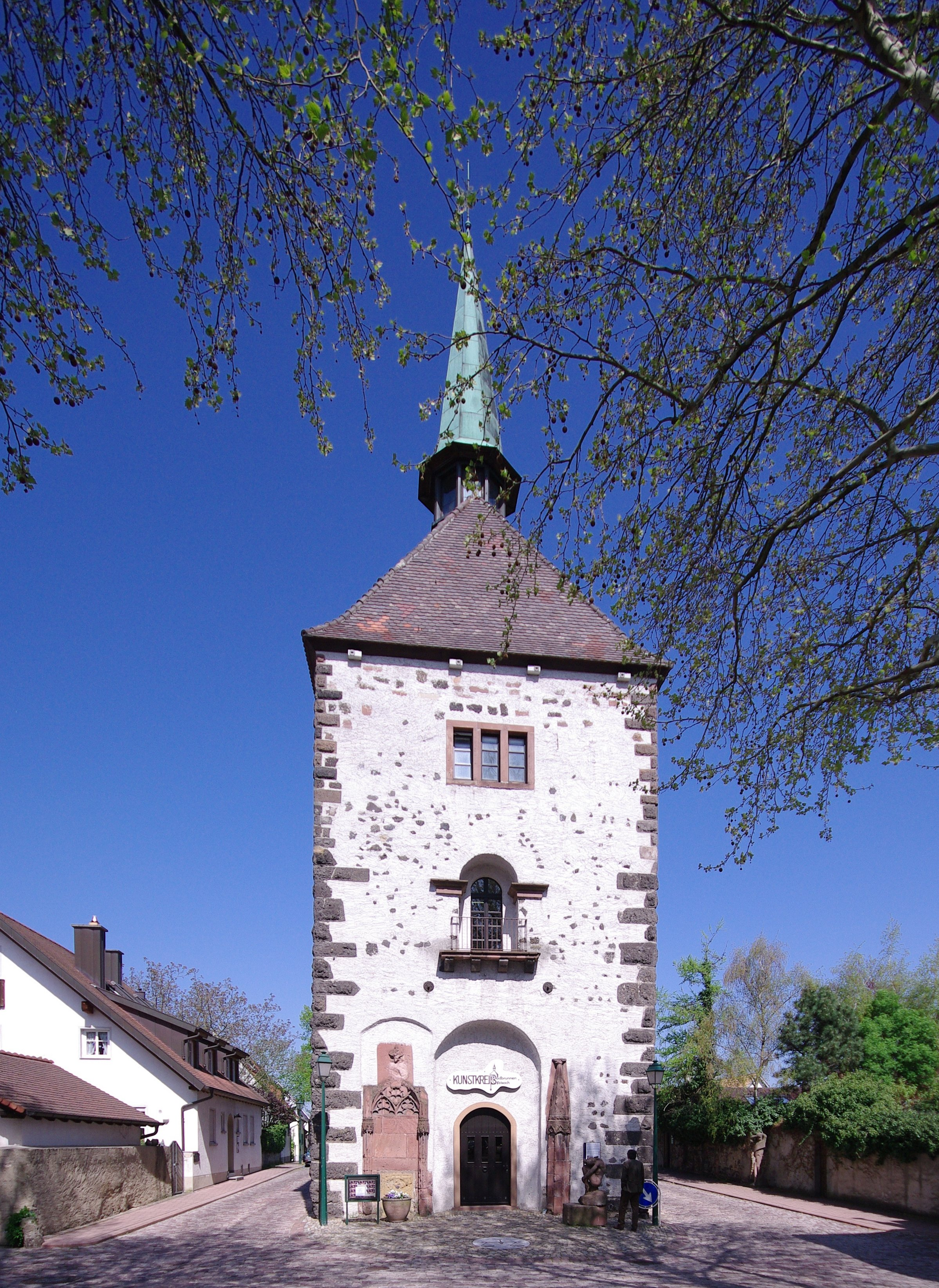 Bilder aus Breisach am Rhein Der Haupteingang des Radturms